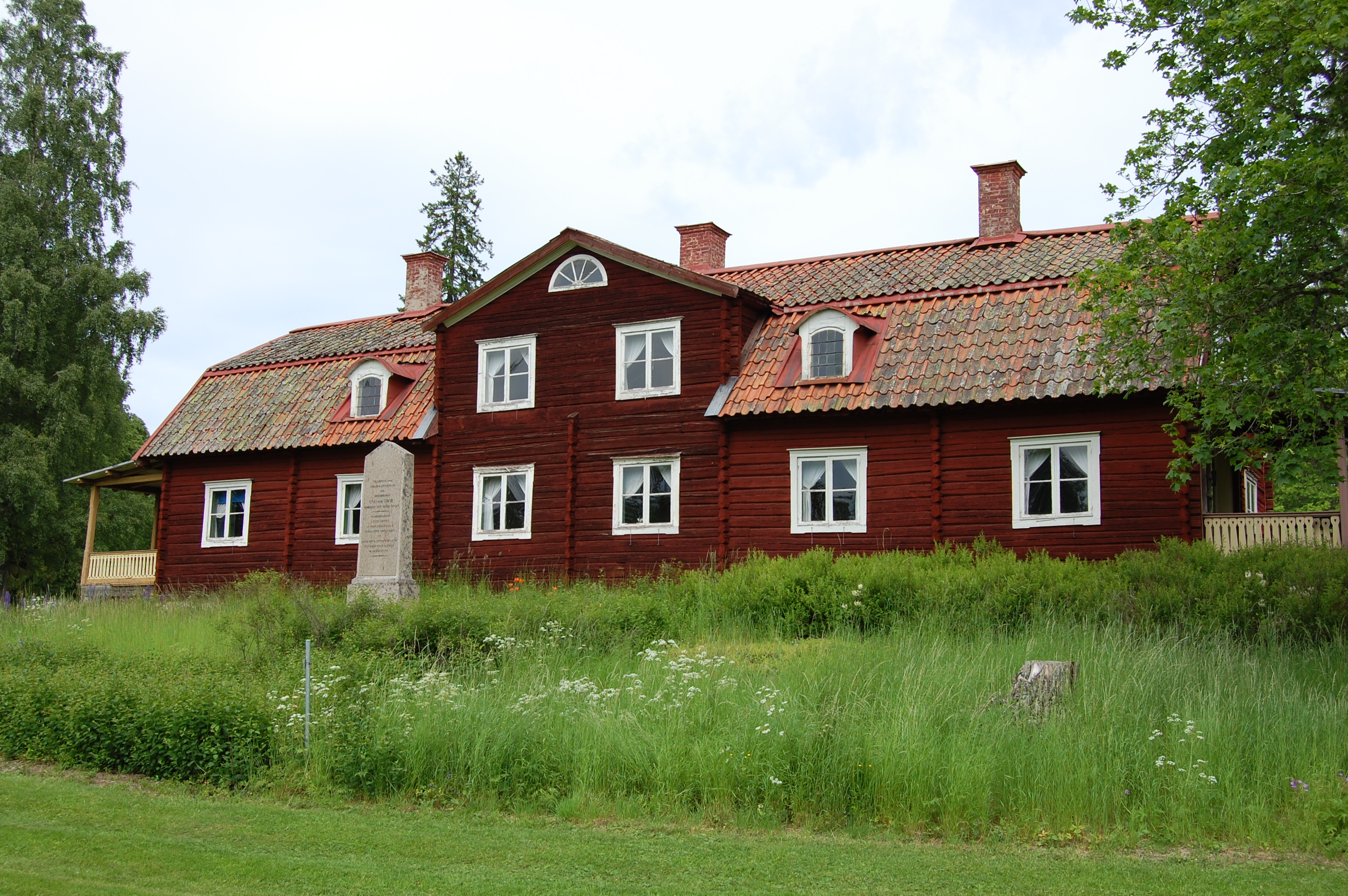 Nybygget på Sätra brunn (kurort)